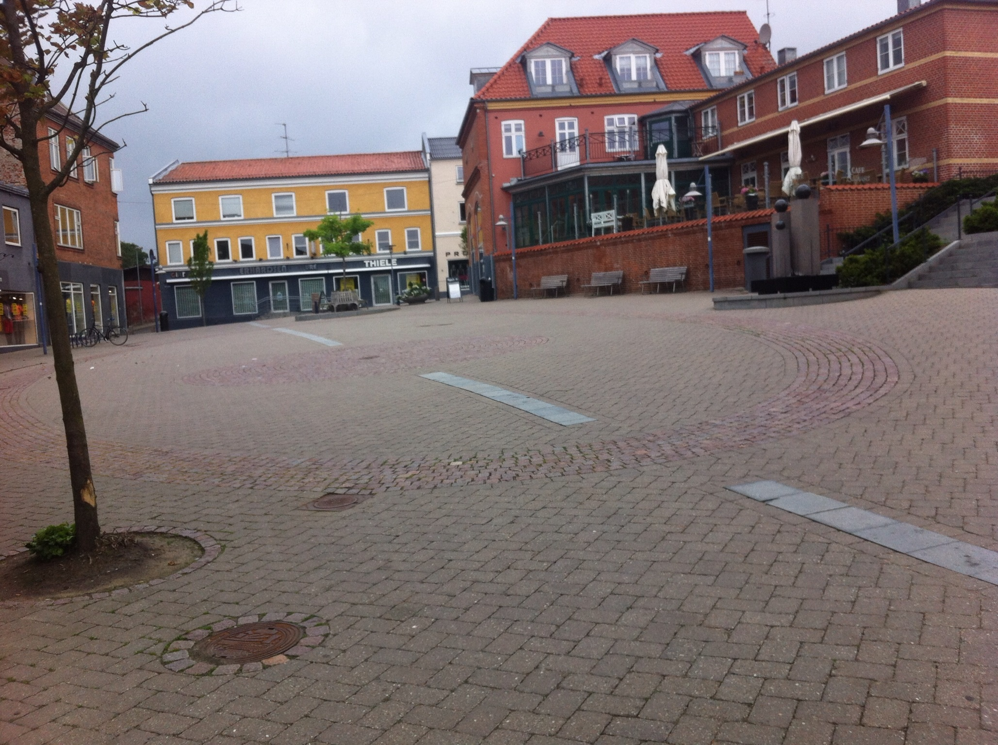 Torvet i Hadsund